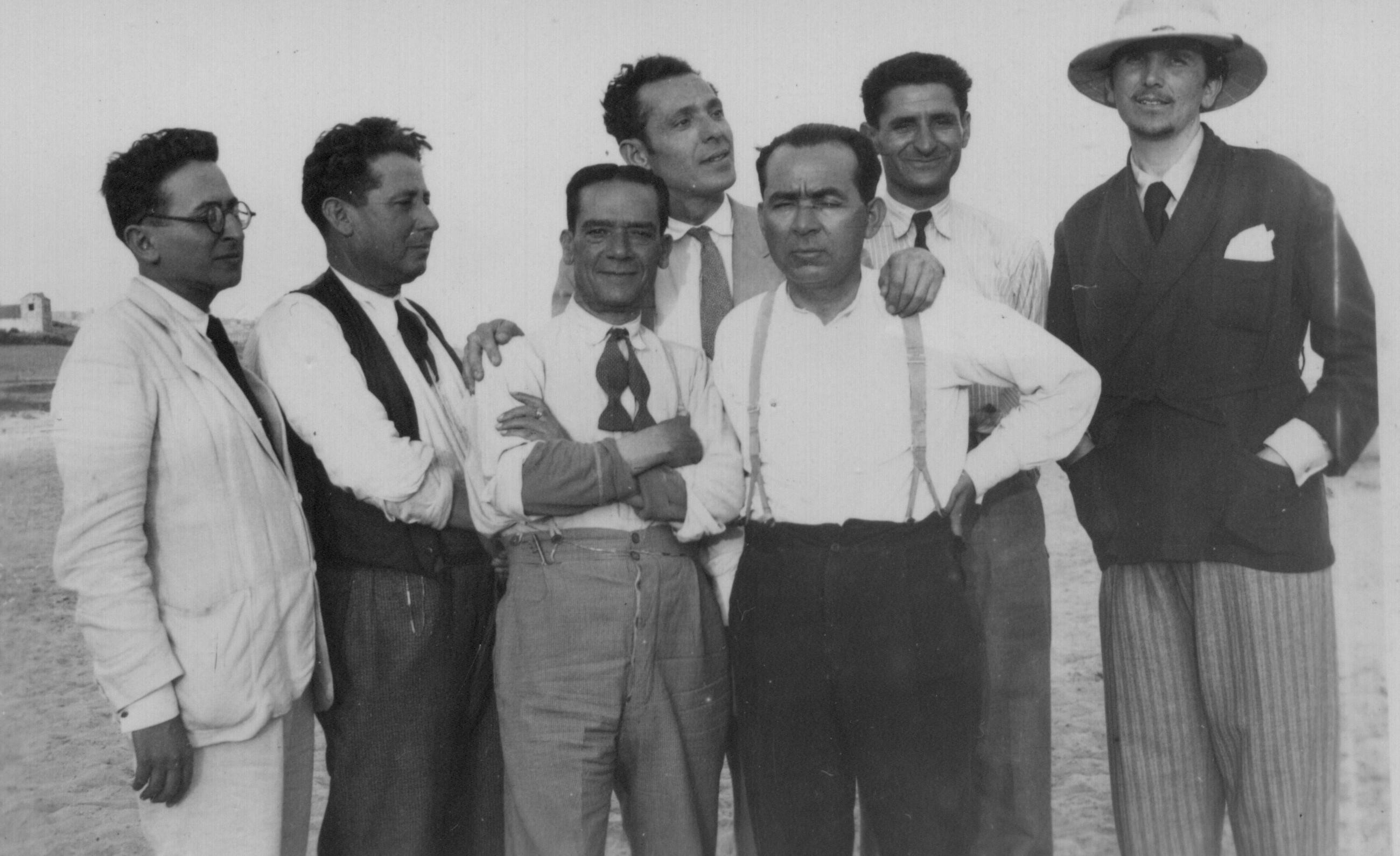 Il sindacalista di Sciacca Accursio Miraglia (2 gennaio 1896 - ucciso dalla mafia il 4 gennaio 1947), con un gruppo di amici al Lido di Sciacca, nel 1940.